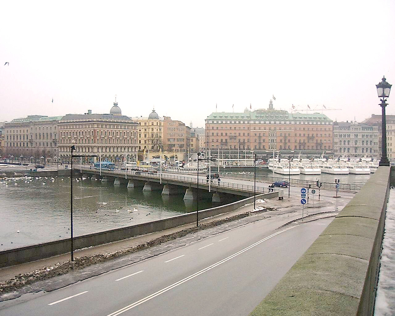 Strömbron, Gamla stan, Stockholm